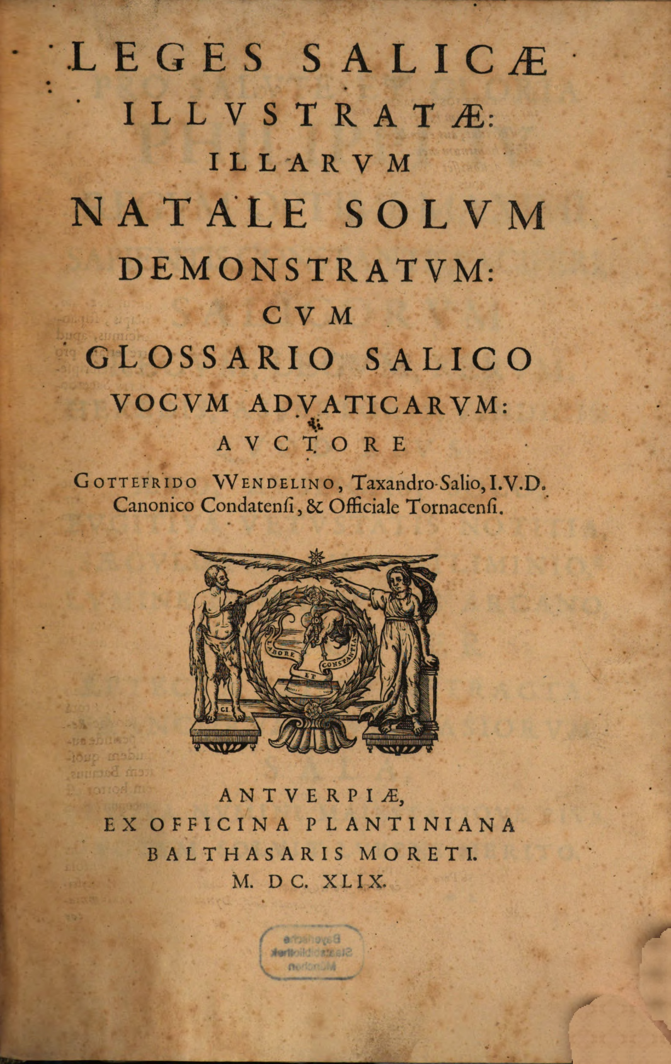 Leges Salicae illustratae